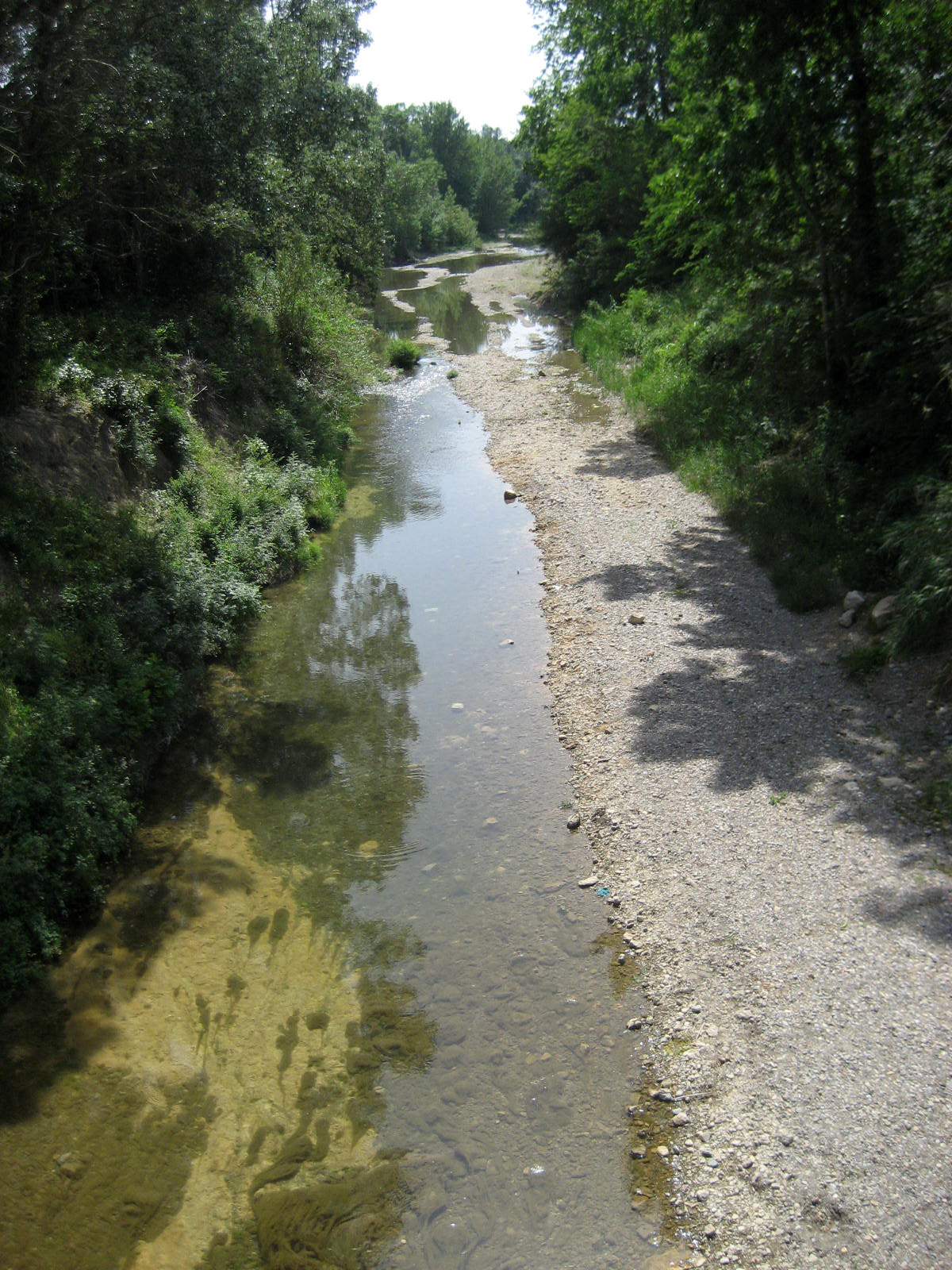 La Berre, seen from route D6009, near Réserve Africaine de Sigean, département de l'Aude, France